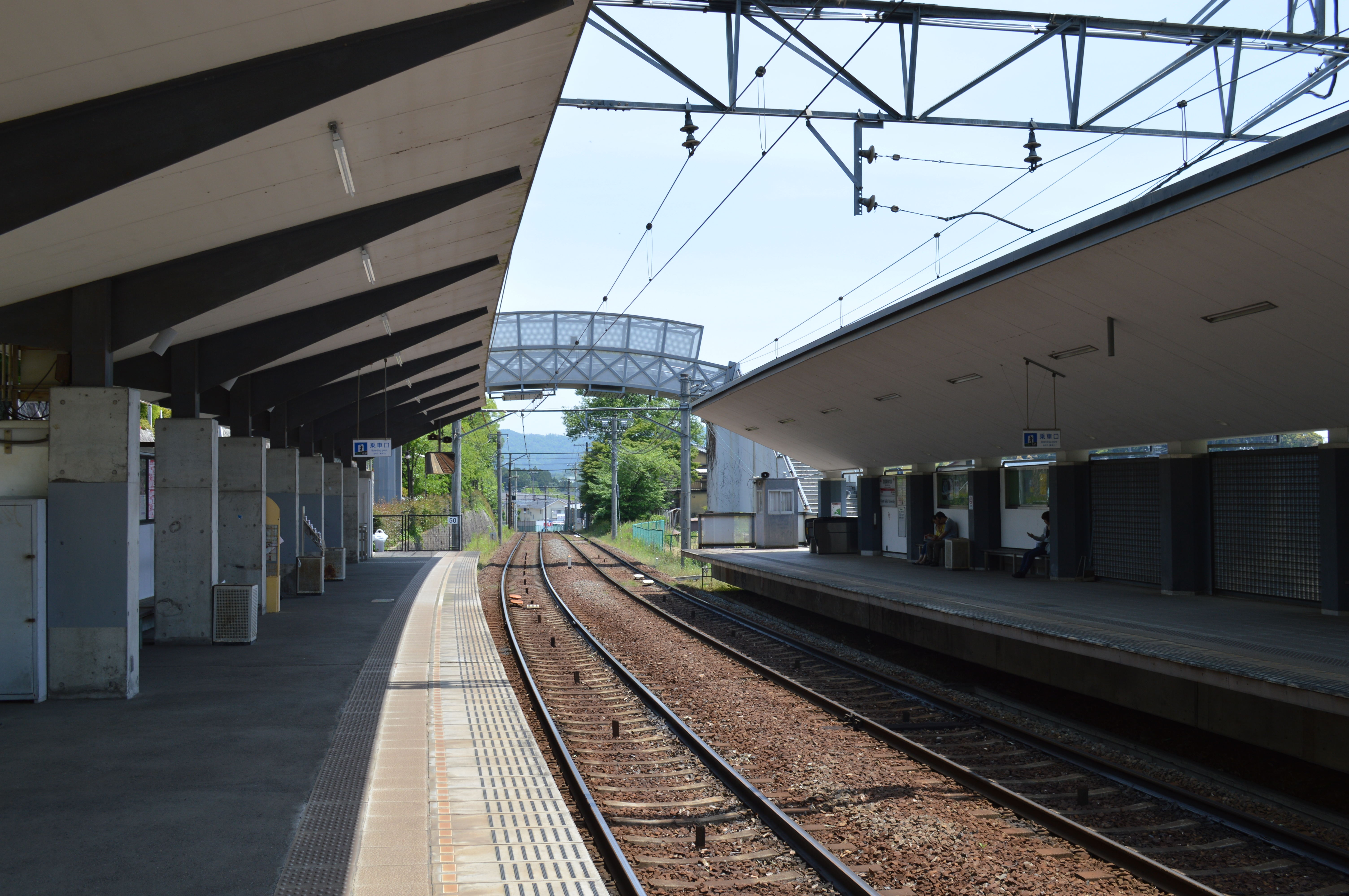 京都市左京区岩倉 叡山電鉄鞍馬線京都精華大前駅 奥に見えるのはパラディオ橋